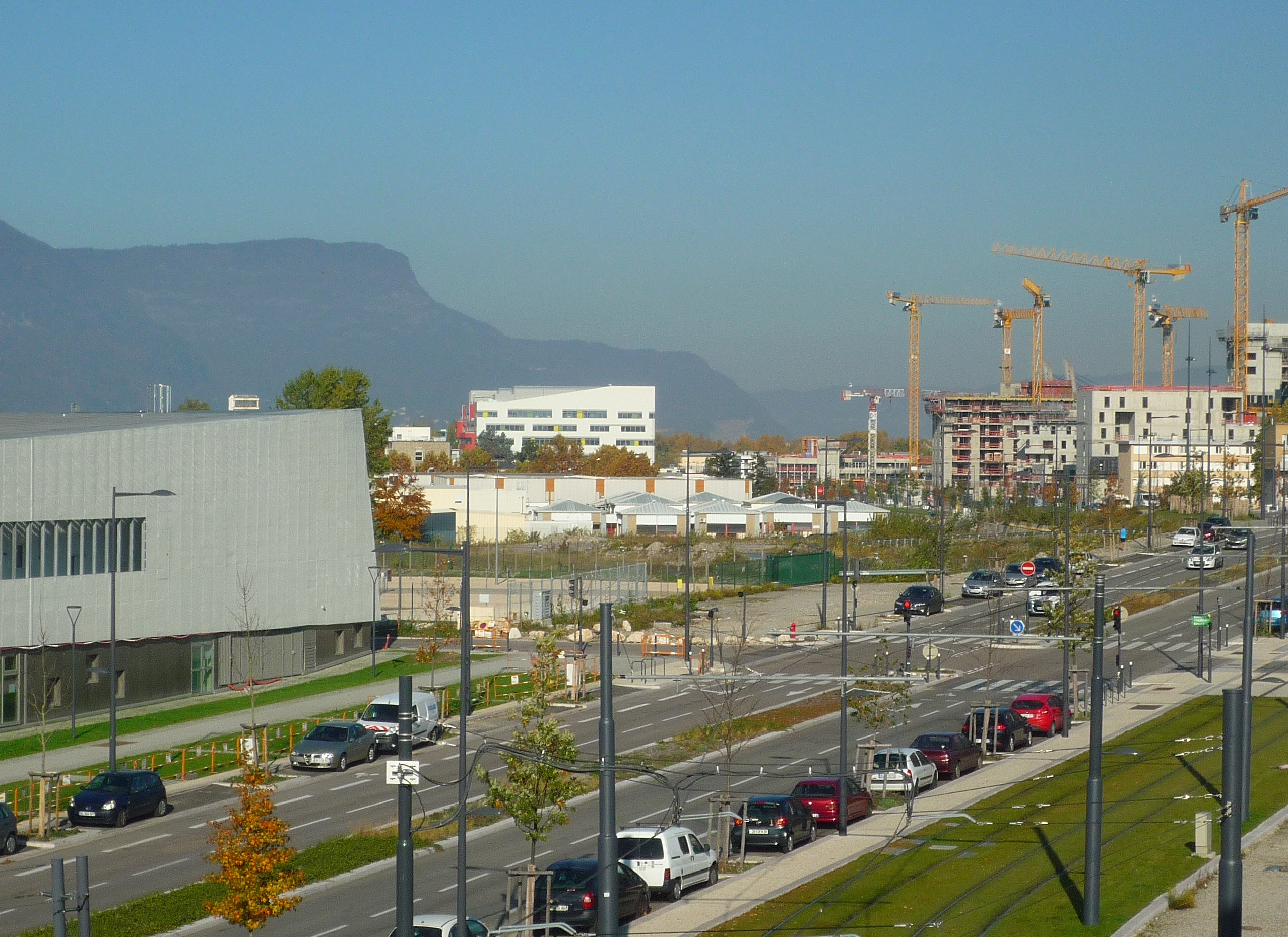 Site du polygone scientifique de Grenoble en novembre 2015.